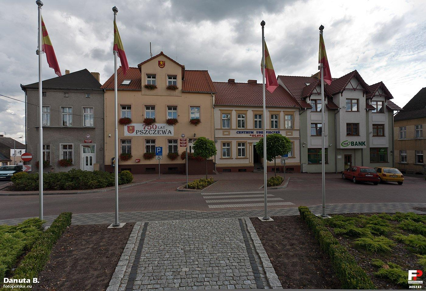 Ryneczek w Pszczewie trąci wielkopolskim Ordnungiem. Czysto i porządnie. W narożnej kamienicy z lewej - urząd stanu cywilnego, w następnej urząd gminy. Ostatnia z prawej - dobudowana współcześnie.